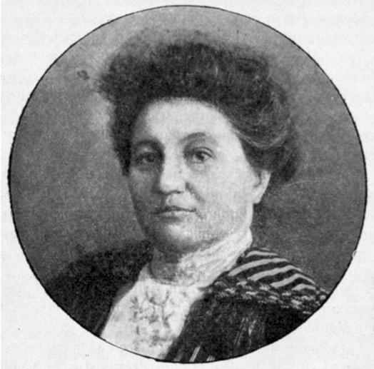 Constanța Hodoș (născută Taloș) (n. 12 octombrie 1860, Zimbru, Arad - d. 19 aprilie 1934, București) a fost o scriitoare română, soția scriitorului Alexandru Hodoș (1863 - 1929) cunoscut în literatură sub pseudonimul Ion Gorun.